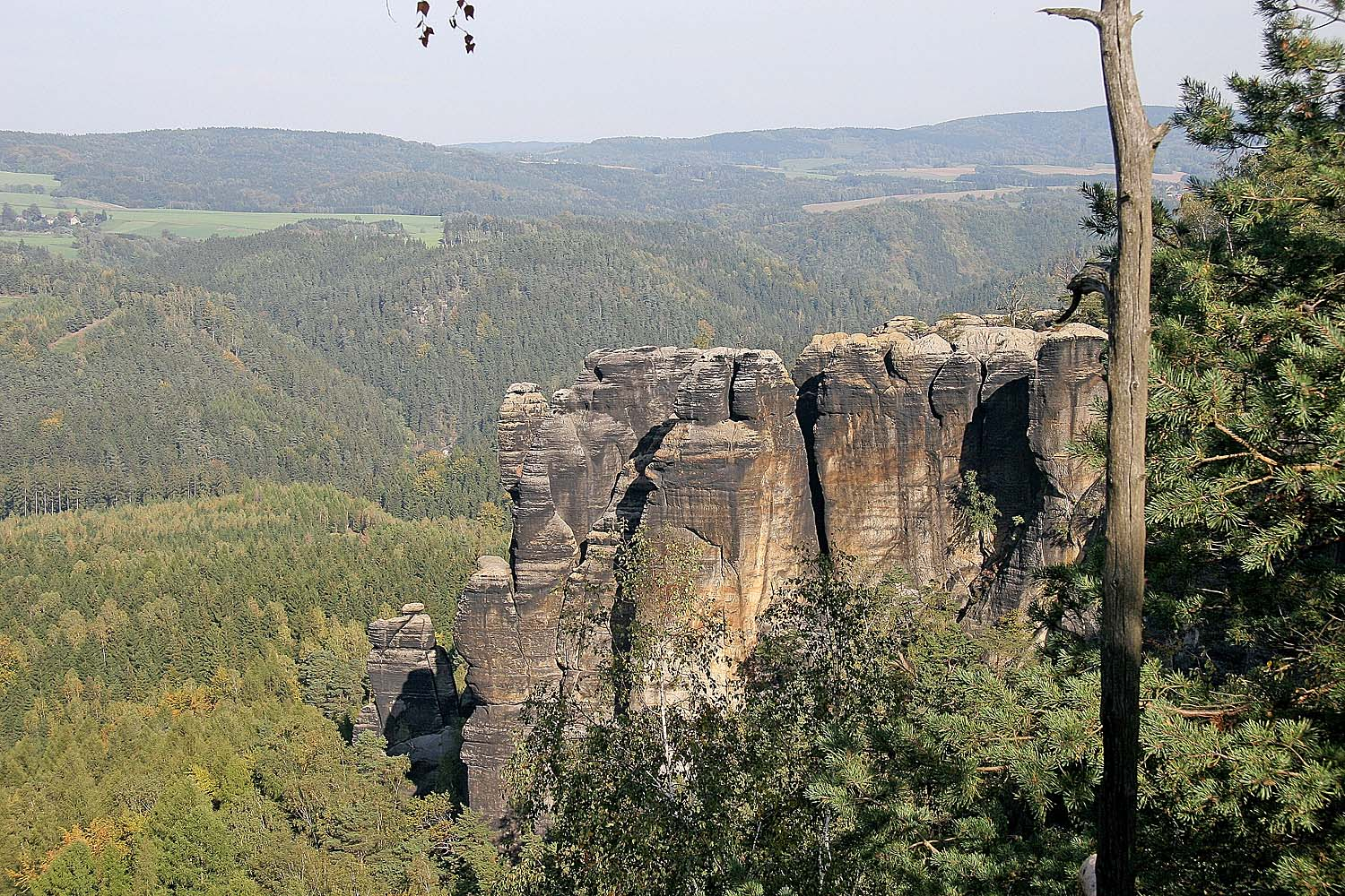 Affensteine in Saxony Switzeland autor: Prazak date: 11. 10. 2006